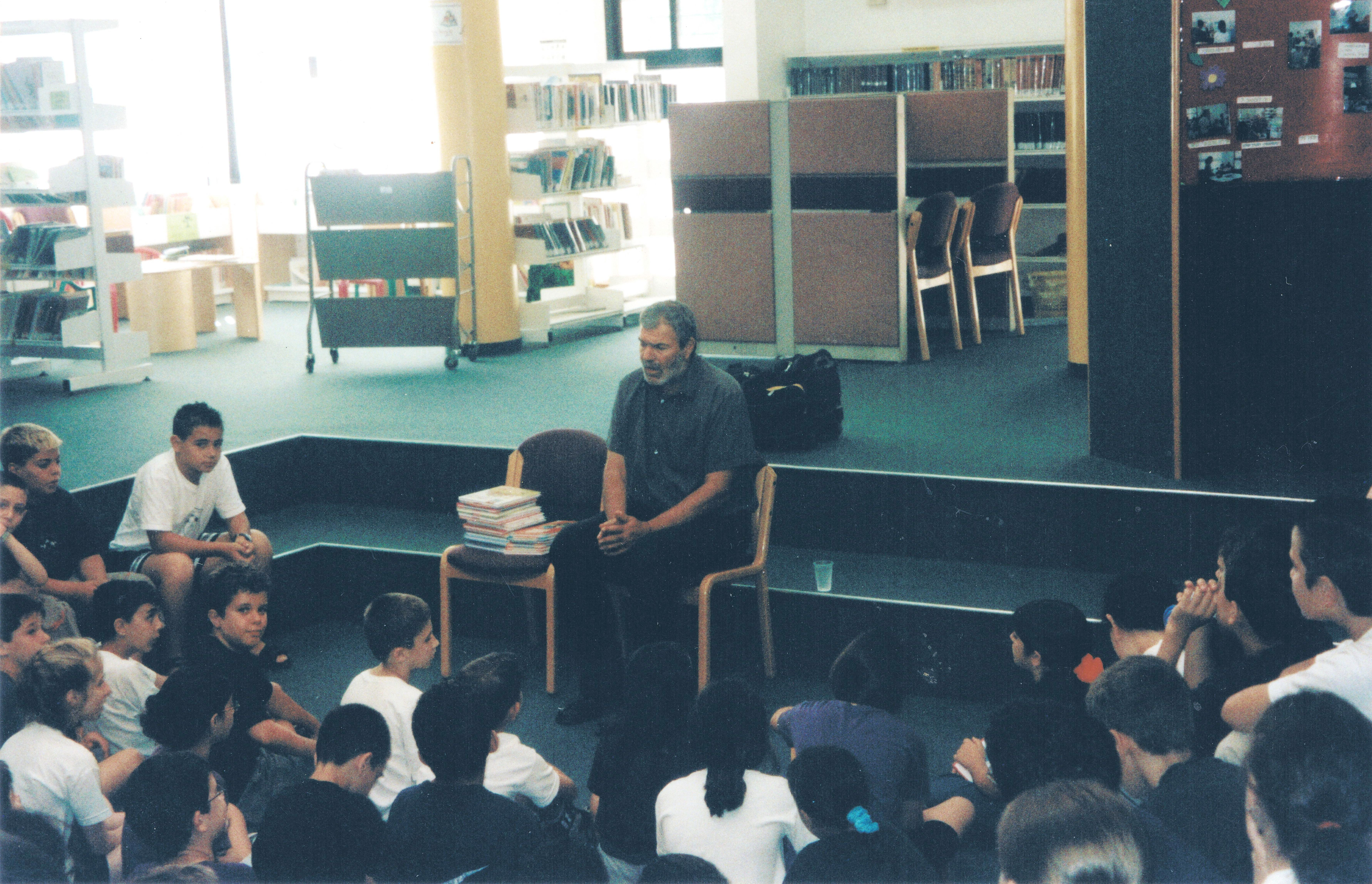 שלמה אבס סופר ילדים ישראלי במפגש עם ילדי נשר בספרייה העירונית